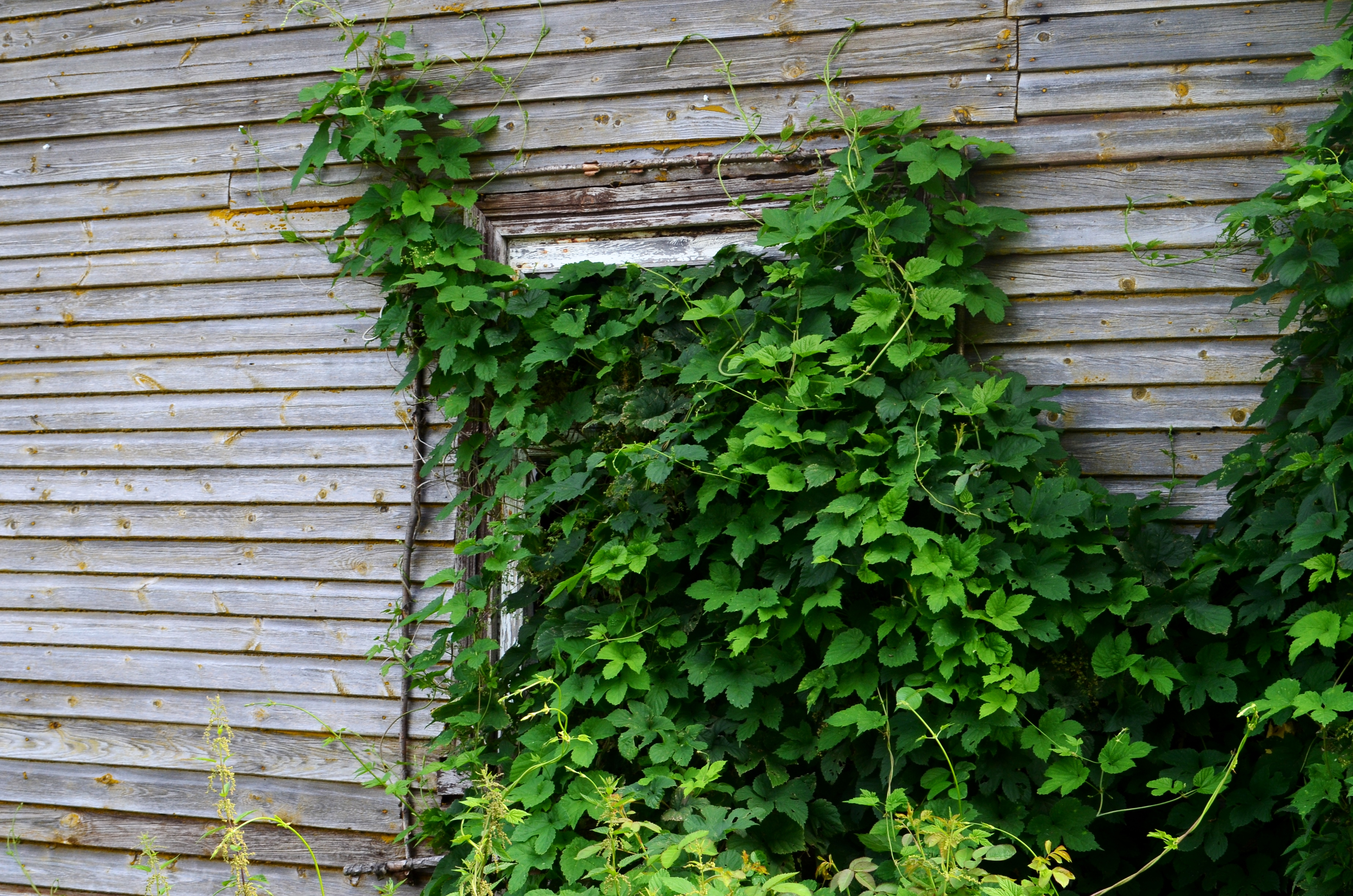 Apleistos gryčios langas, Piktagalio k., Truskavos sen., Kėdainių raj.